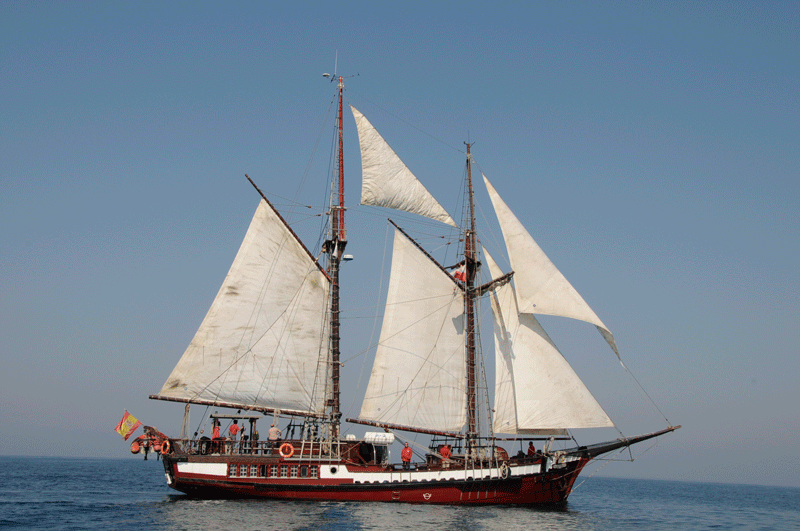 el velamen casi al completo